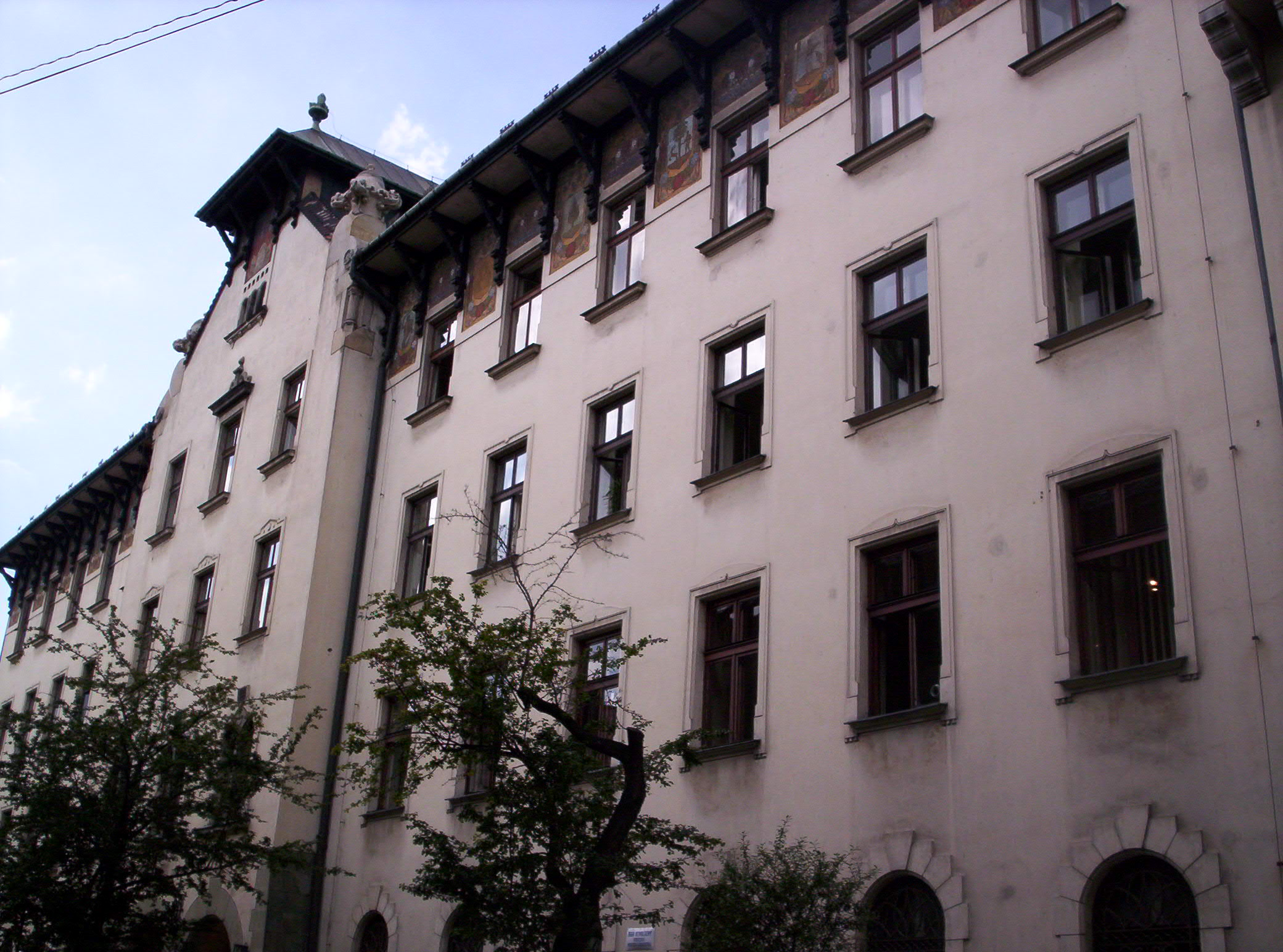 Budynek starego miasta